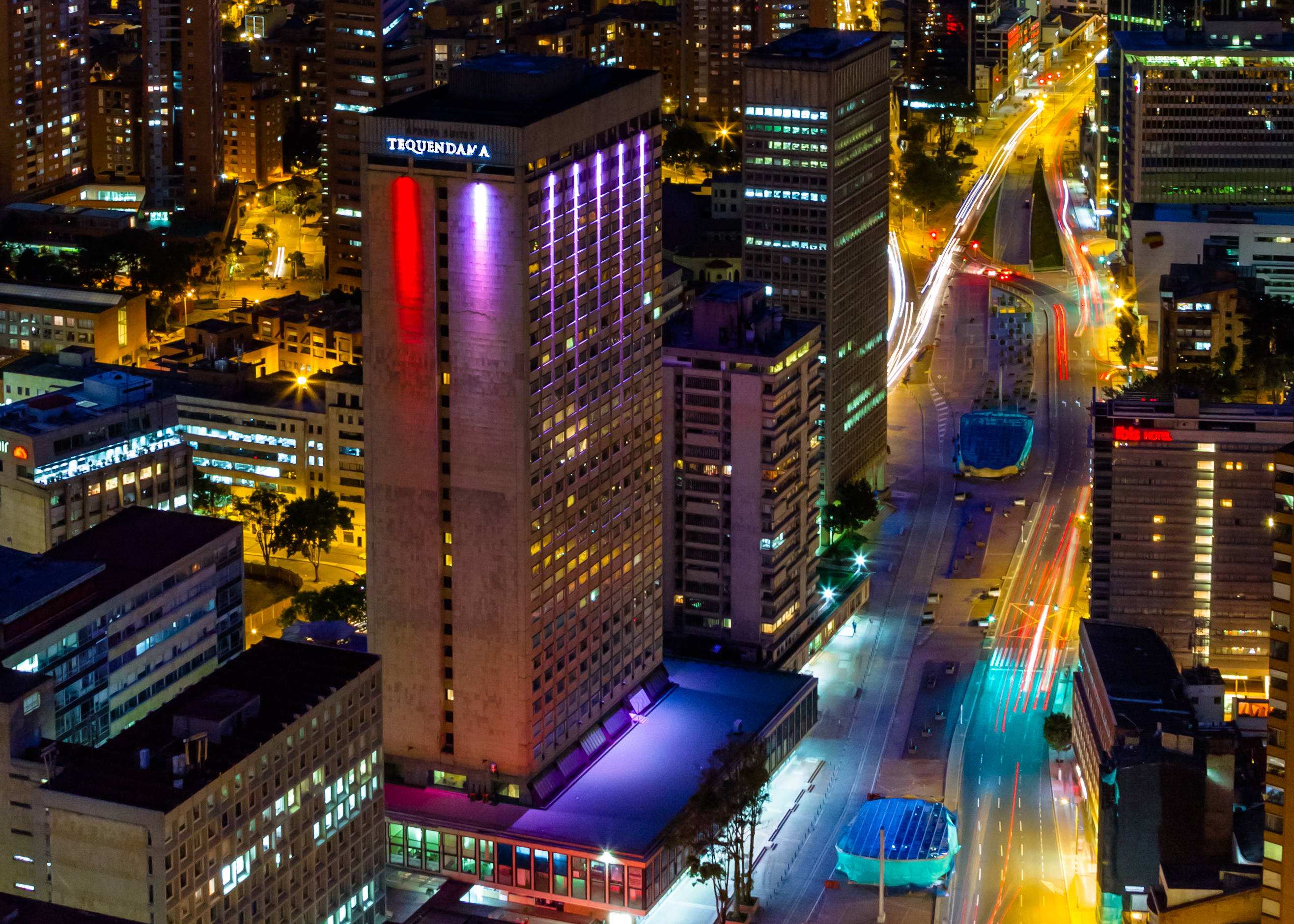 Centro Internacional Tequendama